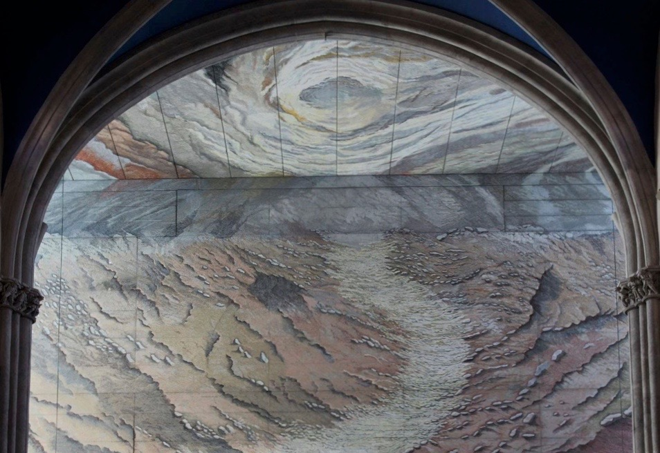 Resultat de la pintura mural, imatge general de Sant Joan Baptista.